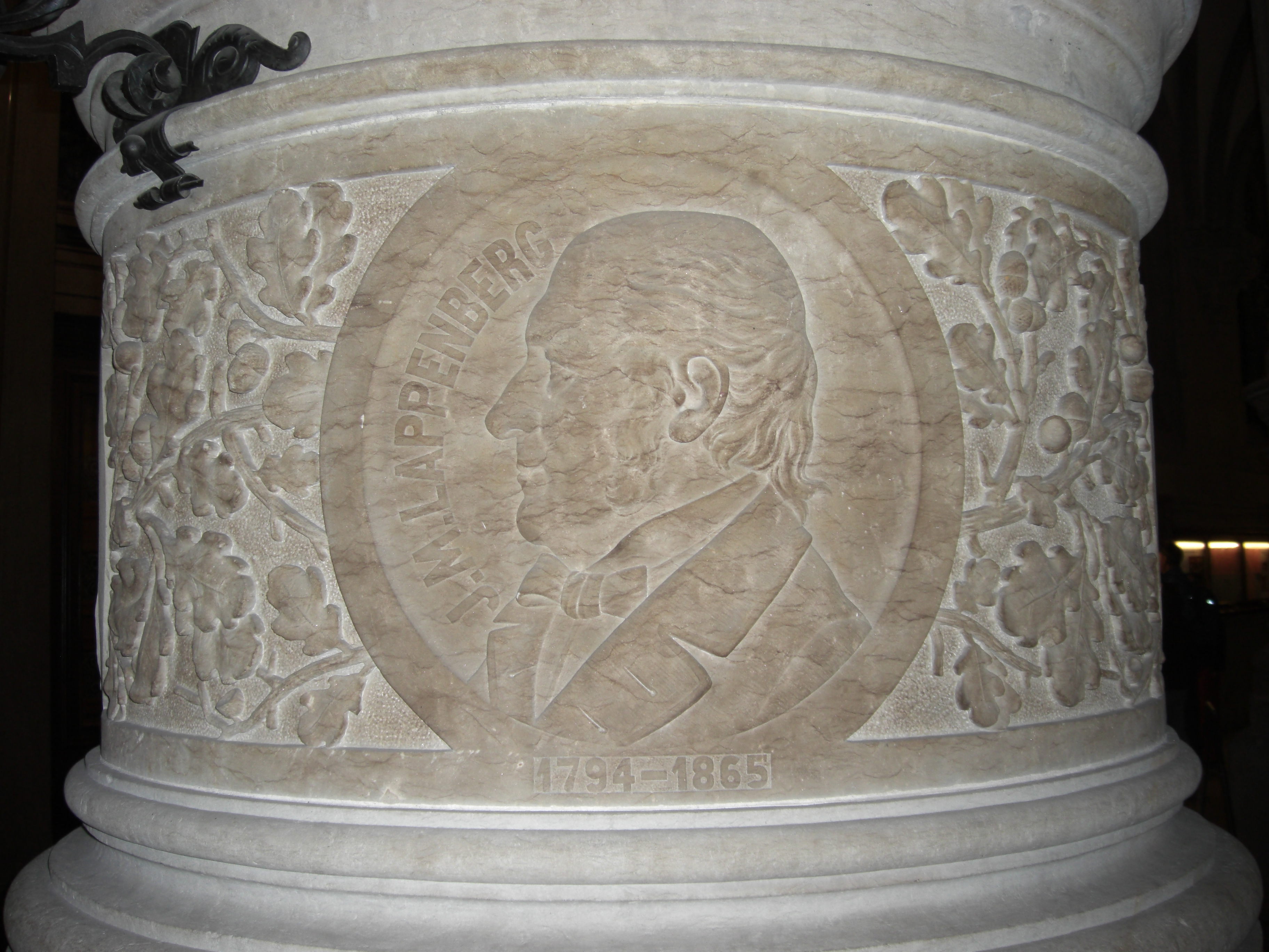 Relief von Johann Martin Lappenberg (1794-1865), Historiker; Hamburger Rathaus, EingangshalleThis is a photograph of an architectural monument.